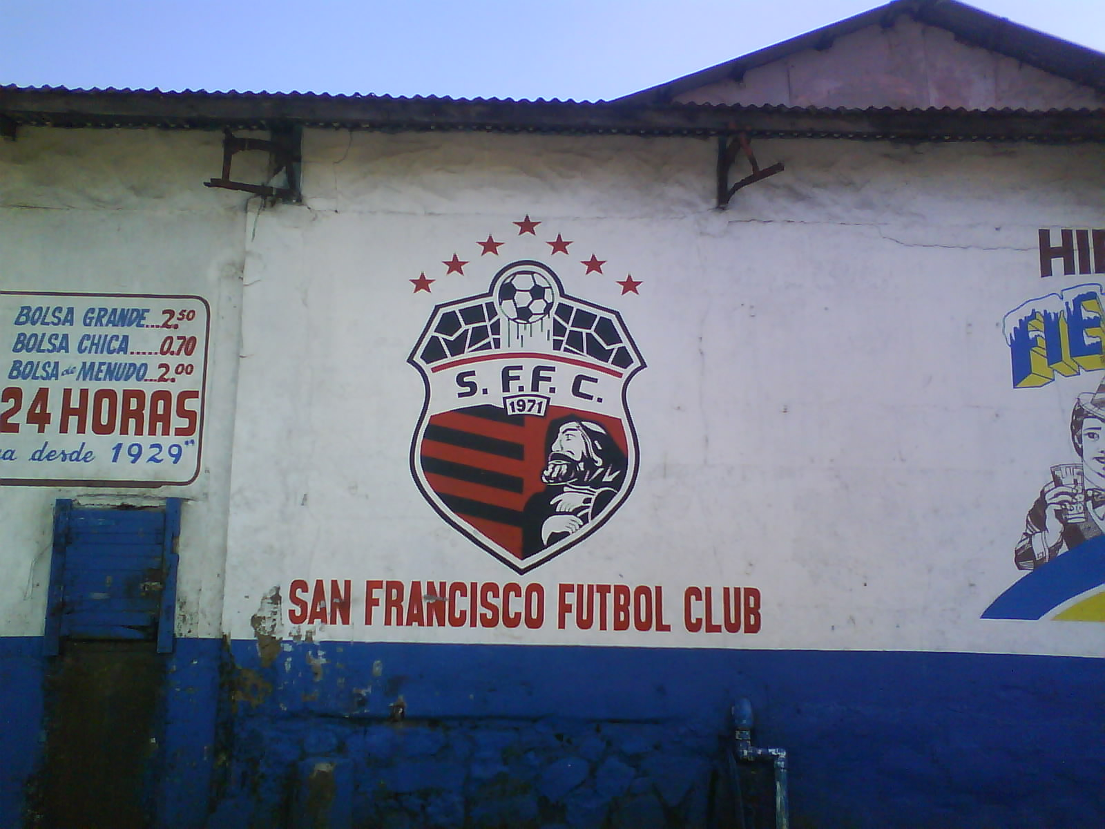 Muro pintado por un aficionado del club en la ciudad.